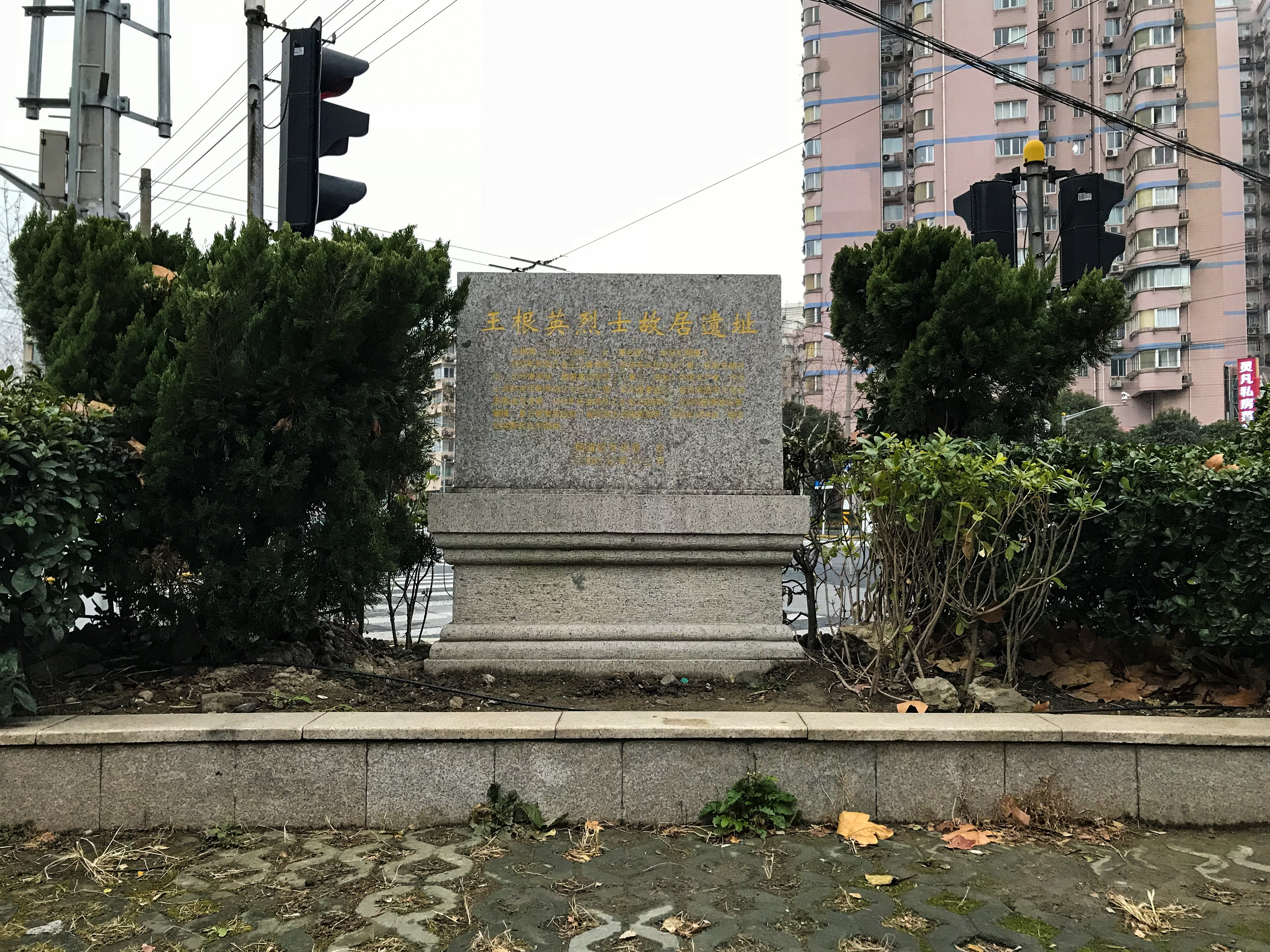 王根英烈士故居遗址 周家嘴路1888号瀚海明玉大酒店内